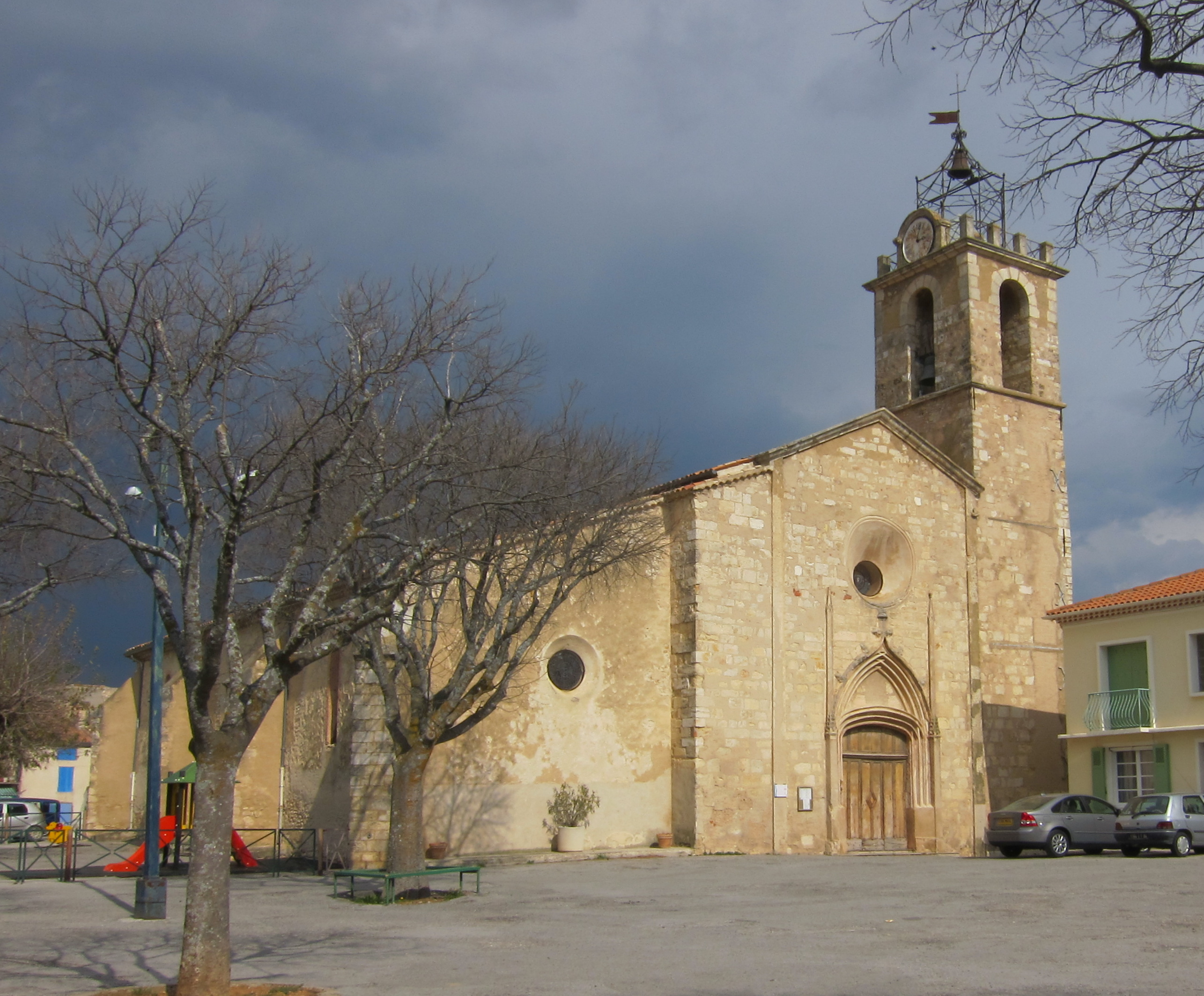 temps couvert côté Nord